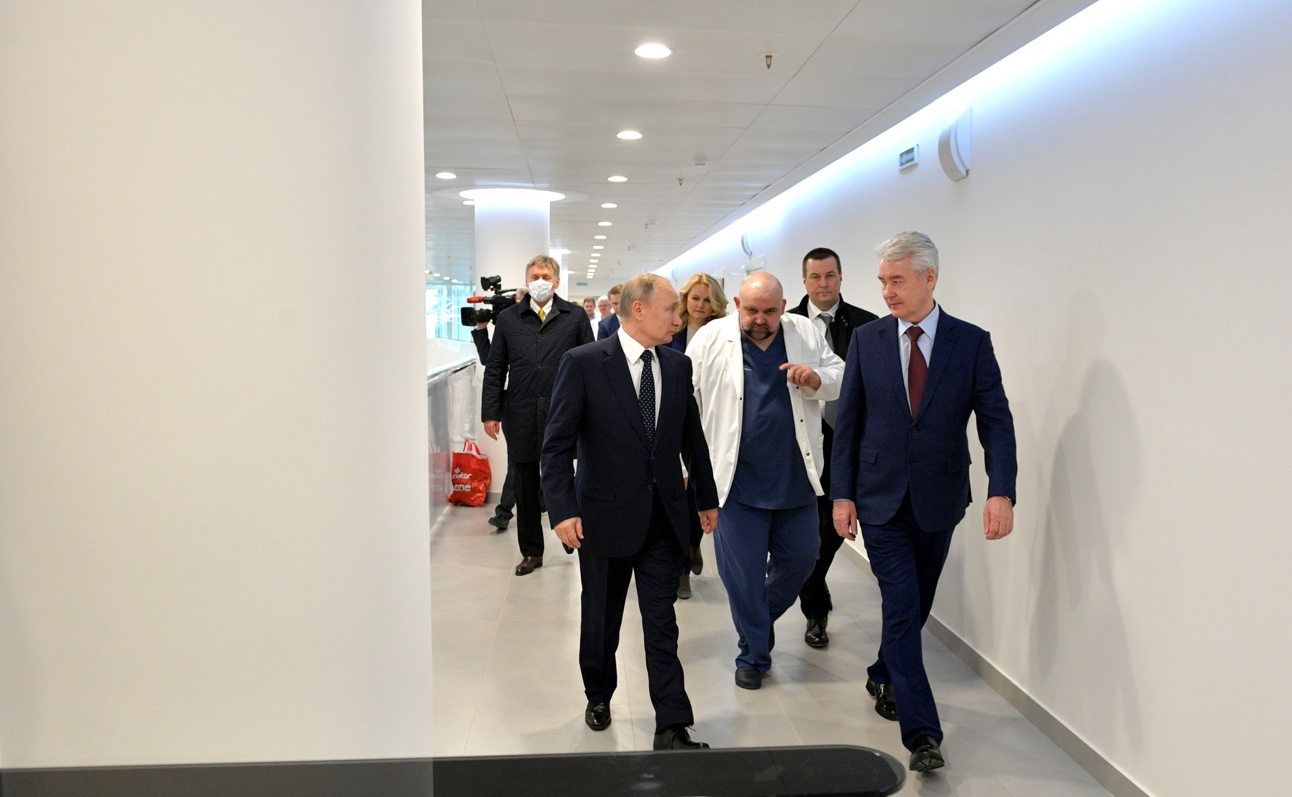 Владимир Путин осмотрел в московском посёлке Коммунарка больницу, предназначенную для пациентов с подозрением на коронавирусную инфекцию. В ходе посещения больницы в московском посёлке Коммунарка, предназначенной для пациентов с подозрением на коронавирус .